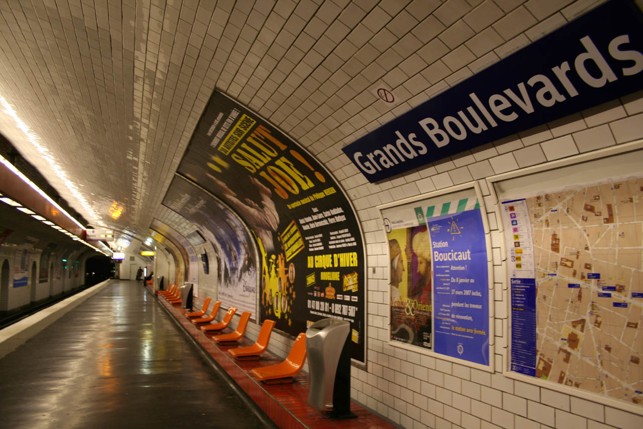 Joseph-André Motte (Français, 1925-2013): siège "Motte", RATP 1973, coque en tôle 10/20 emboutie et émaillée sur banc maçonné et carrelé, station Grands Boulevards Paris.